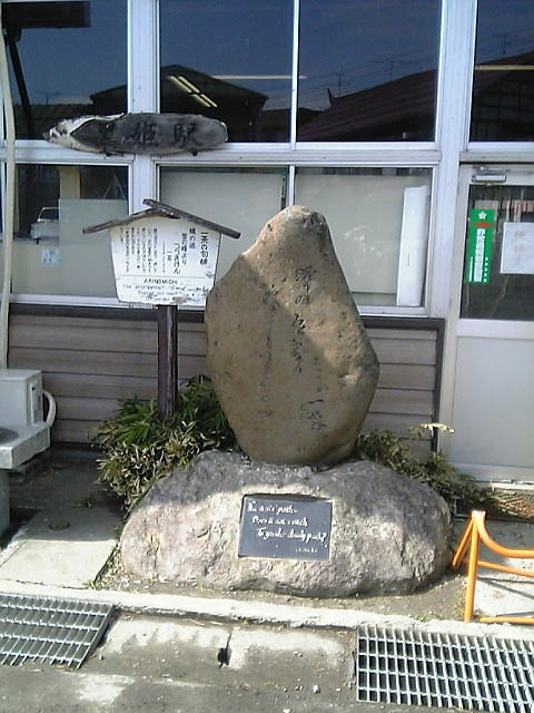 JR黒姫駅に置かれている歌碑